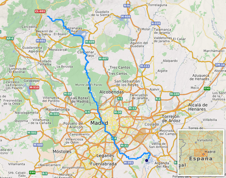 carte réalisée sur umap [1] This map may be incomplete, and may contain errors. Don't rely solely on it for navigation.